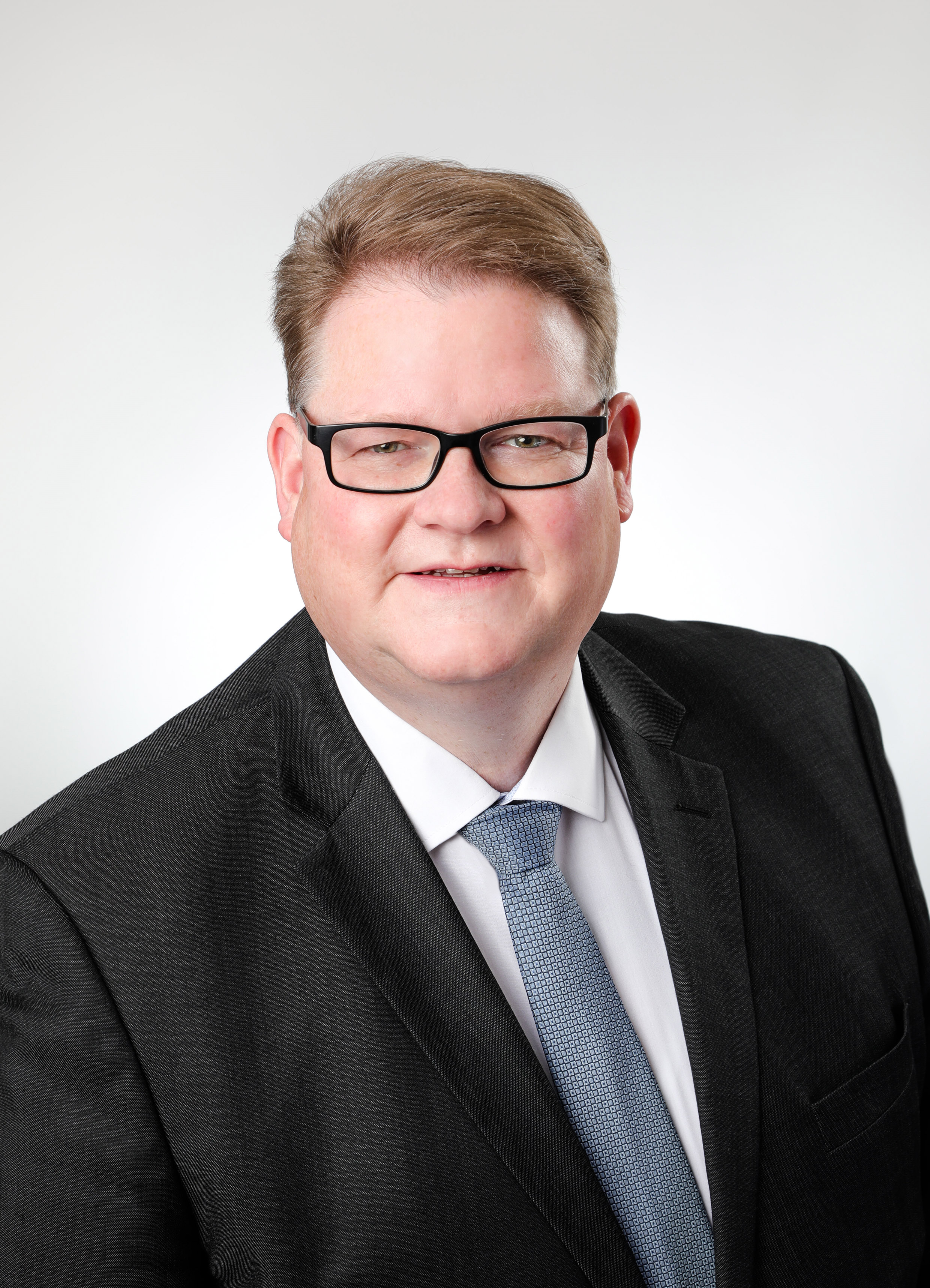 Ralf Seekatz MdEP